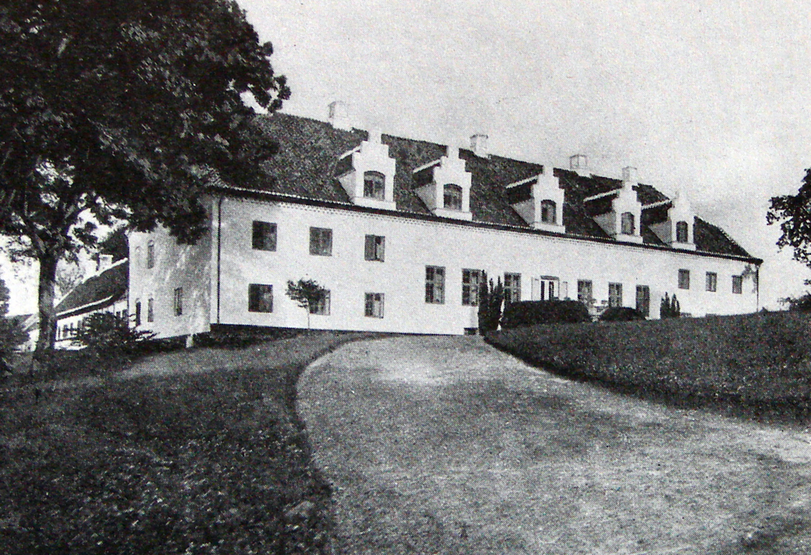 Birkelse set fra vest. Birkelses historie går helt tilbage til 1202, da godset var ejet af Vitskøl Kloster. Gården ligger i Aaby Sogn, Kær Herred, Jammerbugt Kommune. Hovedbygningen er opført i 1555-1697, men er ombygget i 1819 efter en brand.